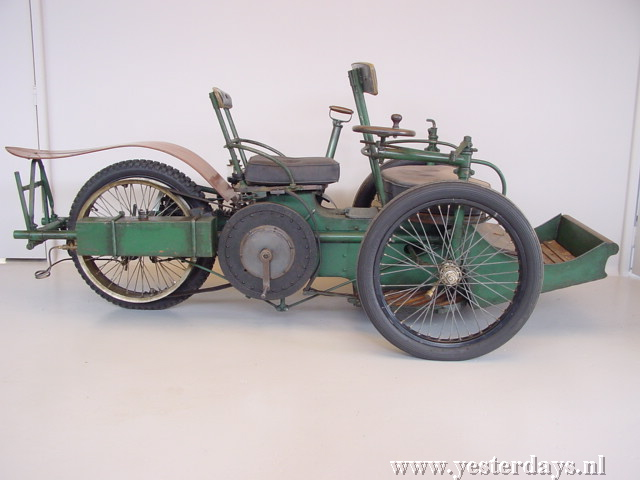 Tricar from Léon Bollée